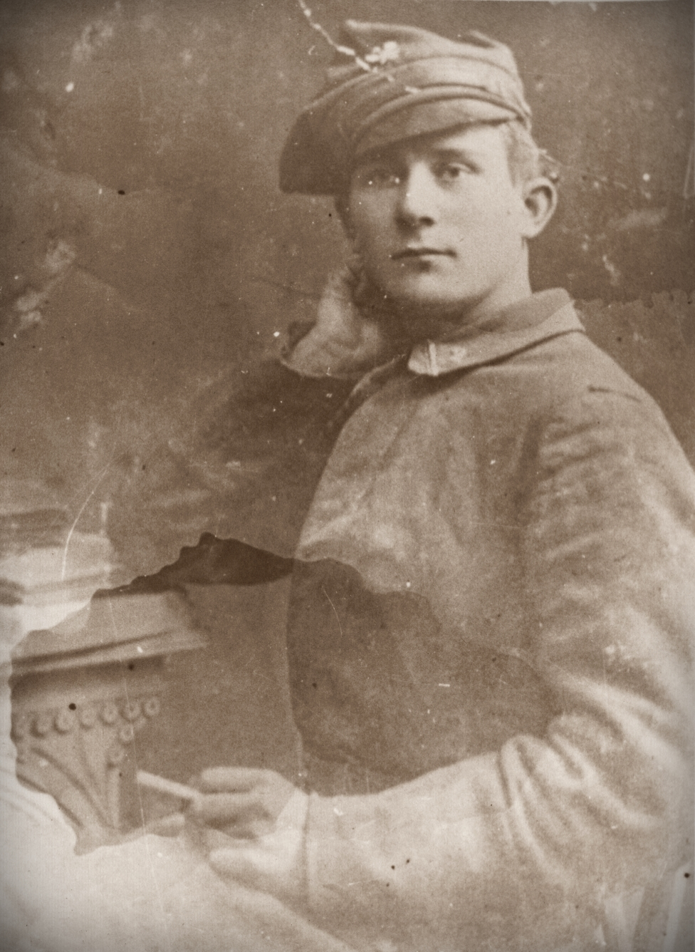 Jan Proszyk jr (1901 Szamotuły - 1973 Szamotuły) powstaniec wielkopolski, foto z 1919 w mundurze powstańca wielkopolskiego